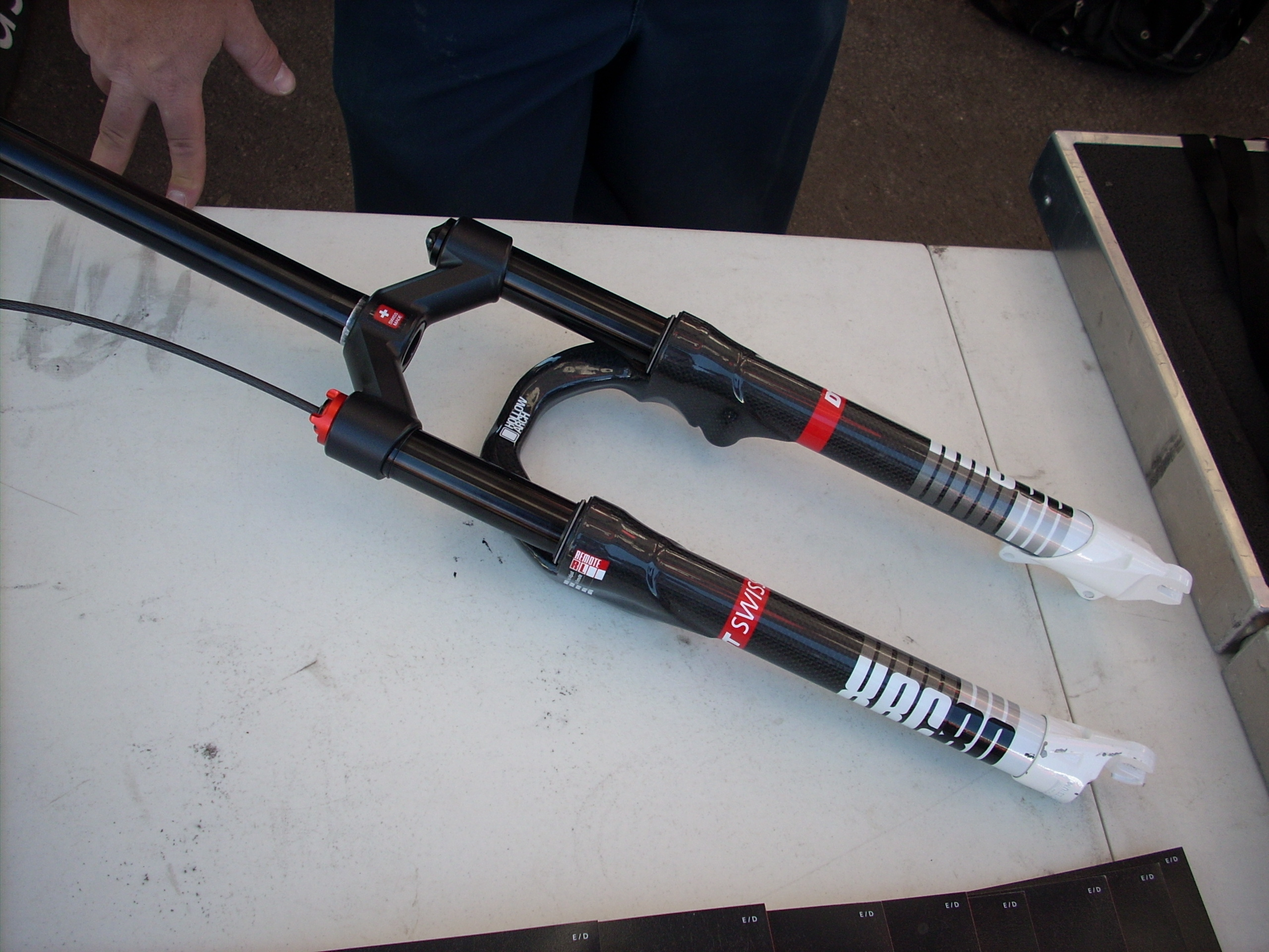 DT Swiss dempergaffel for terrengsykkel.